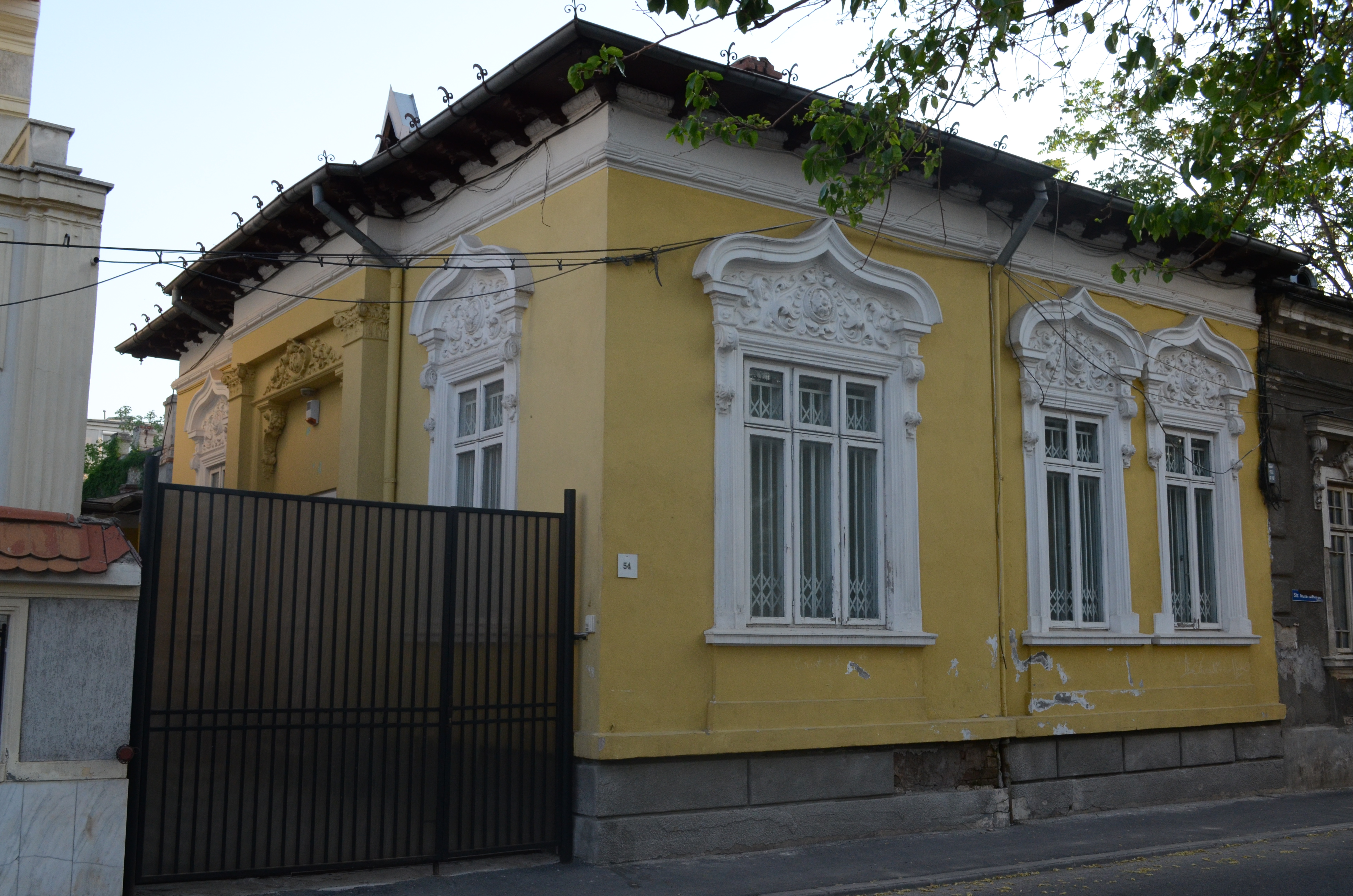 Casă, Strada Matei Basarab nr. 54, Sector 3, București